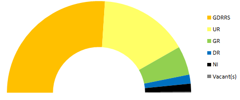 Répartition des sénateurs suivant leur groupe parlementaire après les élections sénatoriales de 1924.